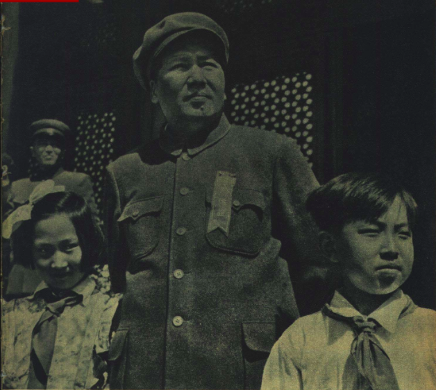 1951年劳动节毛泽东出席庆祝